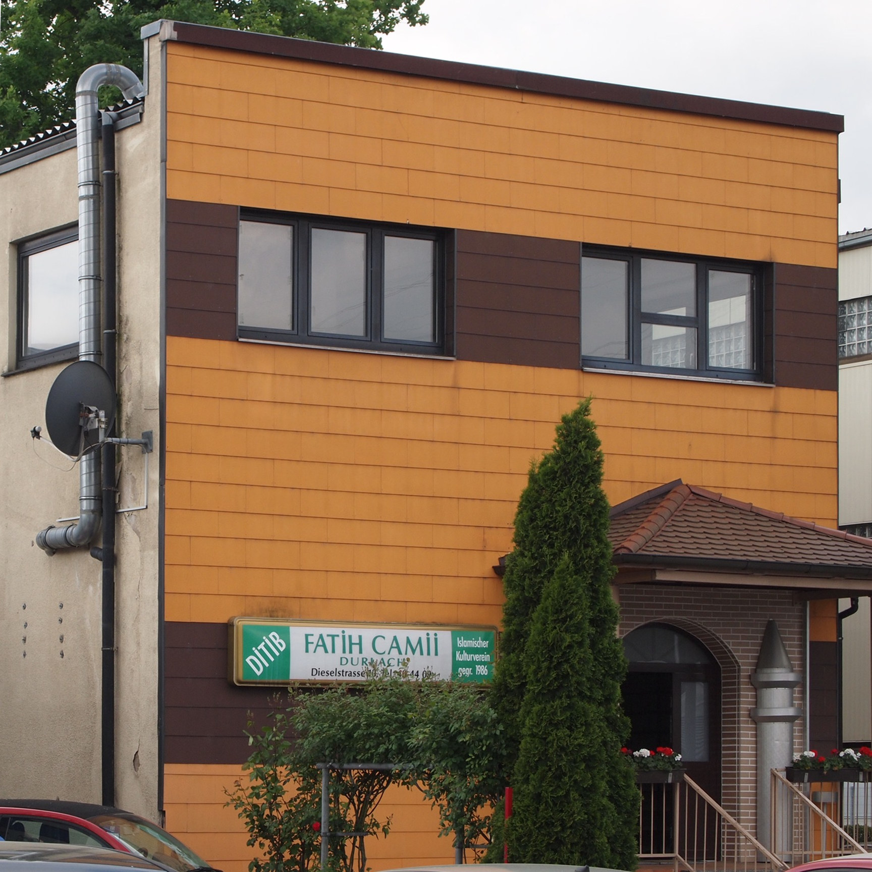 DITIB-Eroberer-Moschee (DİTİB Fatih Camii) in Karlsruhe-Durlach